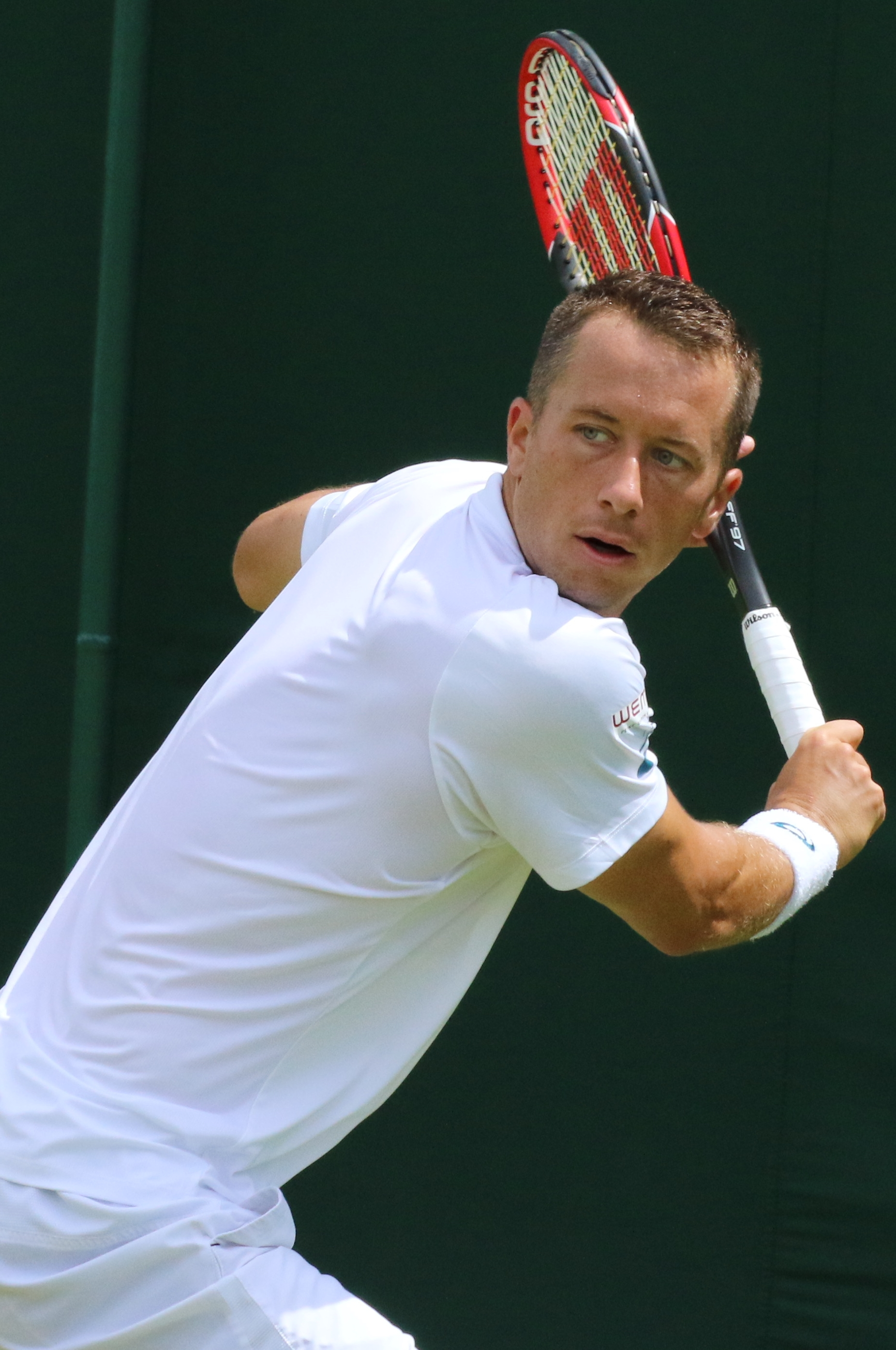 Kohlschreiber WM16 (14)